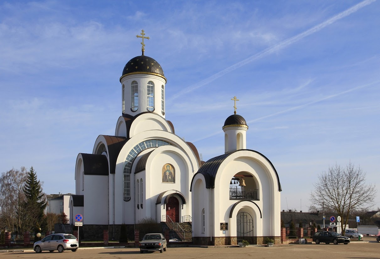 Івянец. Царква Св. Ефрасінні